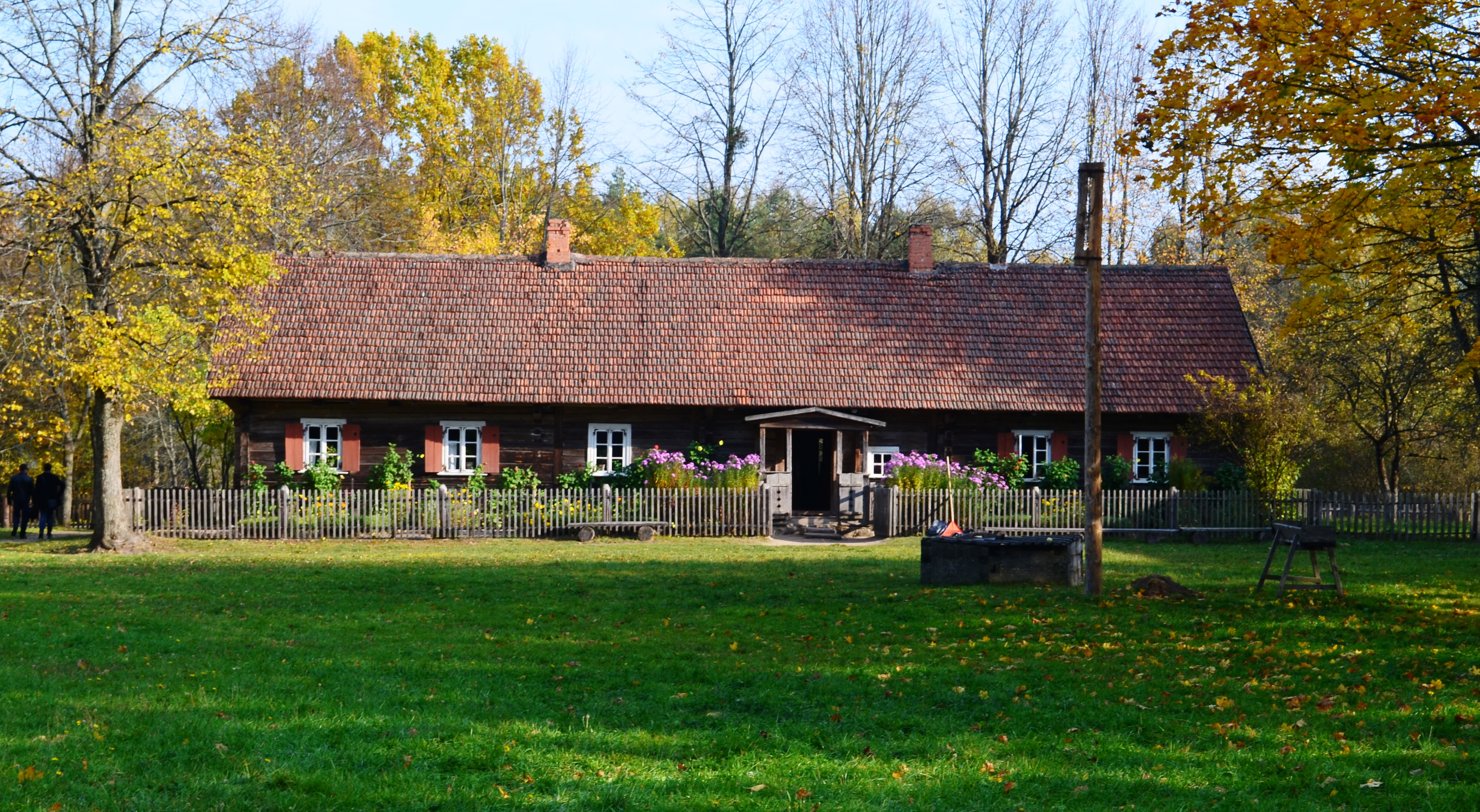 Suvalkiečių stuba iš Obelijos, Rumšiškių muziejus